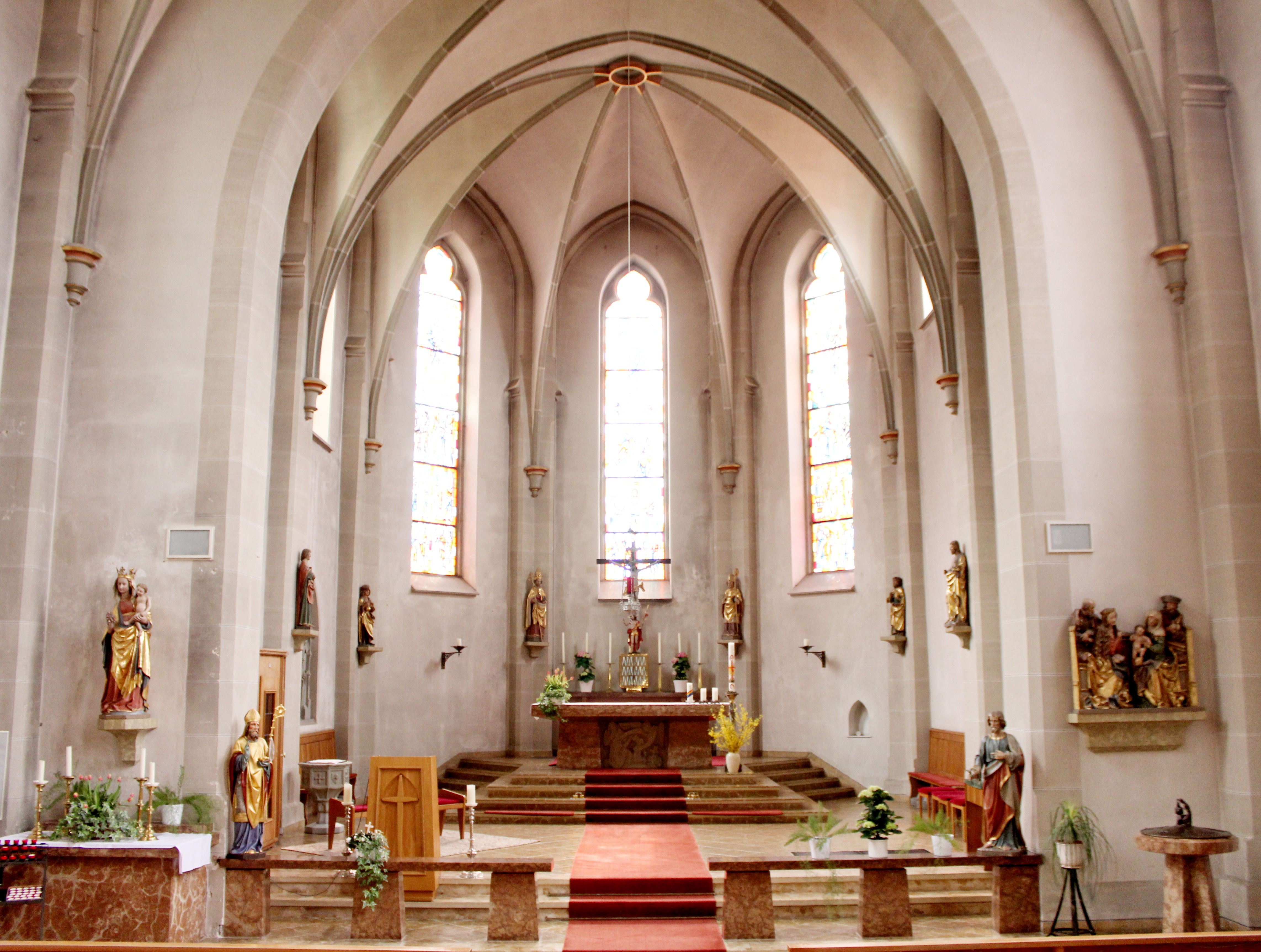 Die Stadtpfarrkirche St. Nikolaus geht mit ihren Vorgängerbauten bis auf das Jahr 1316 zurück. Von den Anfängen zeugt der untere Turmschaft mit einem romanischen Eingangsportal und einem romanischen Taufstein im Eingangsbereich. Das Langhaus, der Chor und der obere Teil des Glockenturmes entstanden 1862-71. In der Kirche sind bedeutende gotische und barocke Schnitzwerke zu sehen: Künstlerfamilie Strüb, Niklaus Weckmann, Jörg Syrlin d. J. Die Chorfenster sind ein Werk des bekannten Ulmer Glasmalers Wilhelm Geyer.